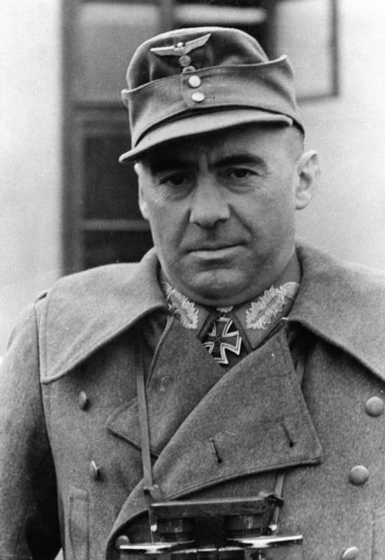 Ungarn Eichenlaubträger Generalmajor Bayerlein, 29.3.44 ; Prop.-Kp. HKBZ F Bildberichter: Dinstühler, Text: Dinstühler Film-Nr.: 8/7